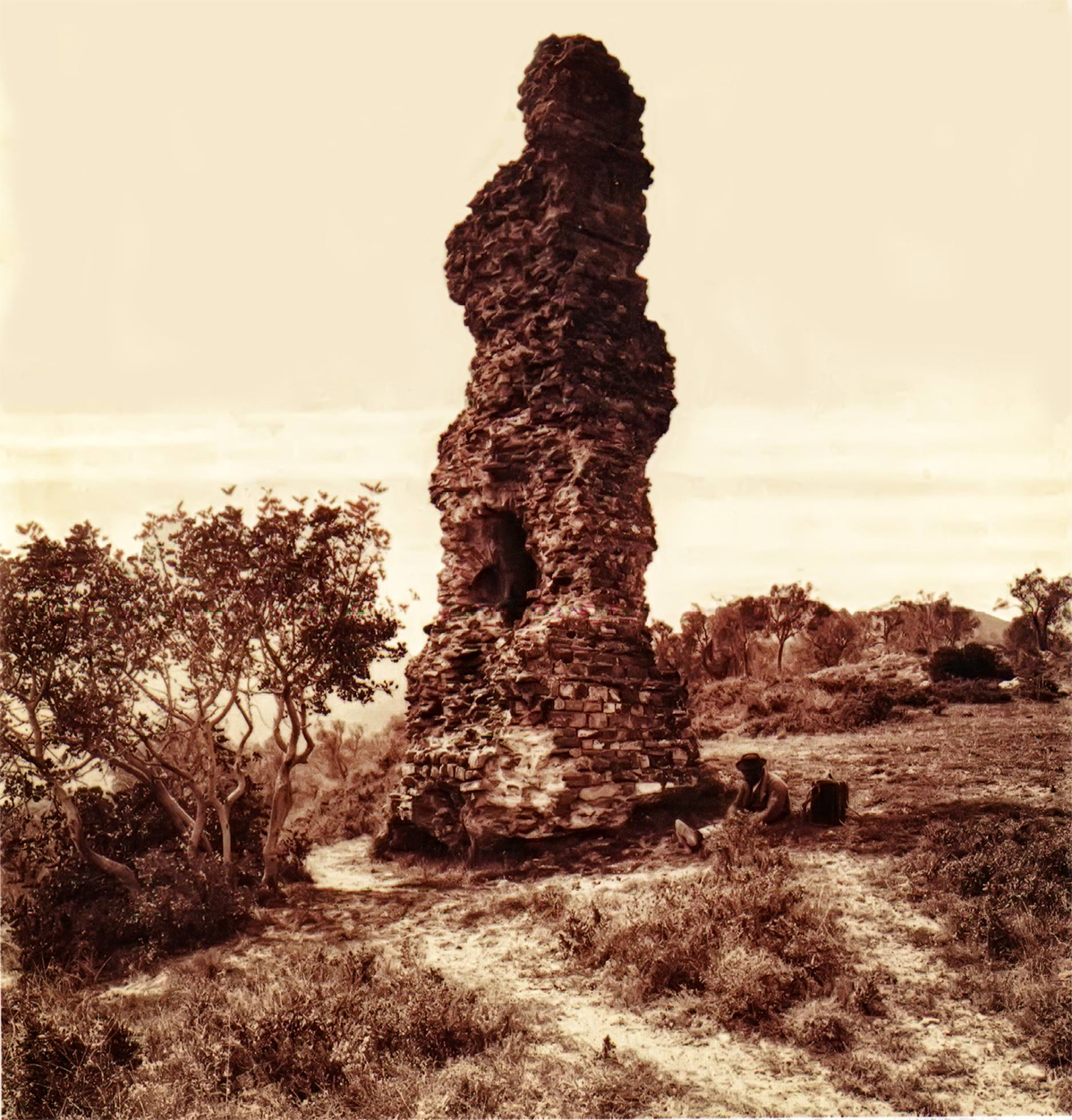 Pilone Romano originale fine 800 con un pastorello alla base